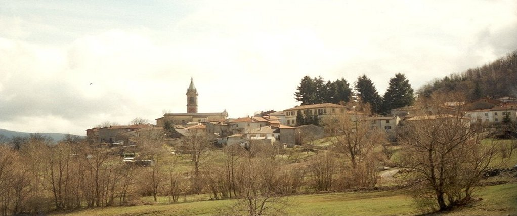 Vista da via Pieve Vecchia / Ca' del Sarto anni90'